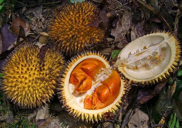 Pekawai or nyekak, Durio kutejensis from Sungai Utik, Kapuas Hulu, West Kalimantan, Indonesia